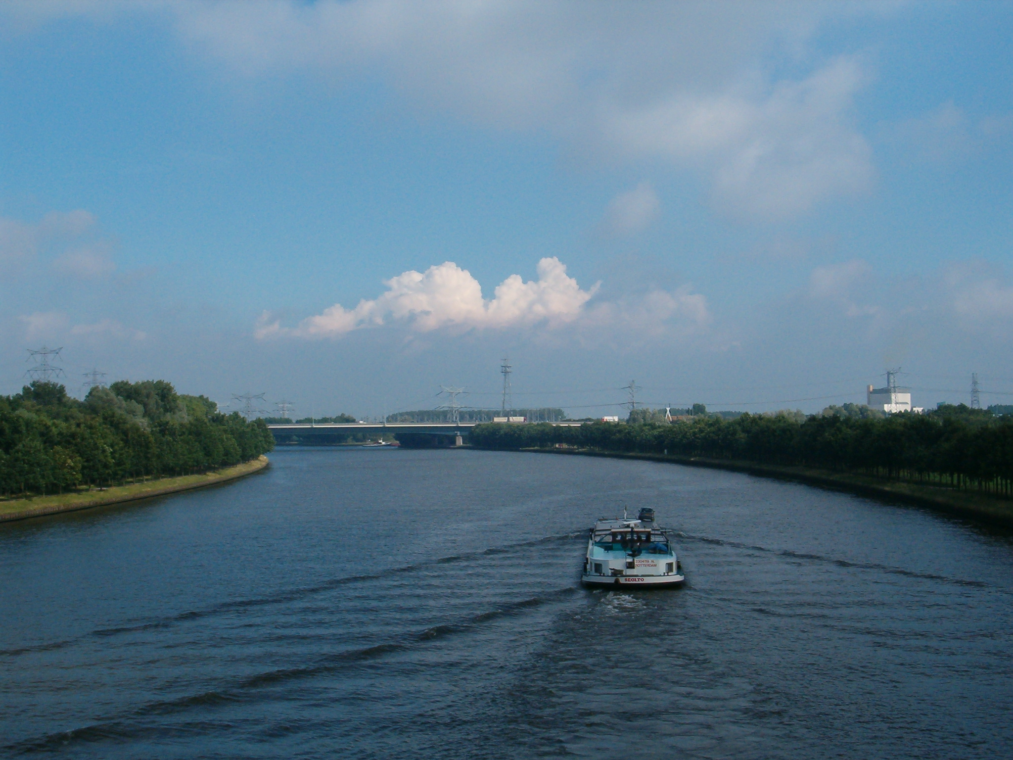 Amsterdam-Rijnkanaal, a canal in The NetherlandsAmsterdam-Rijnkanaal, een kanaal in Nederland.